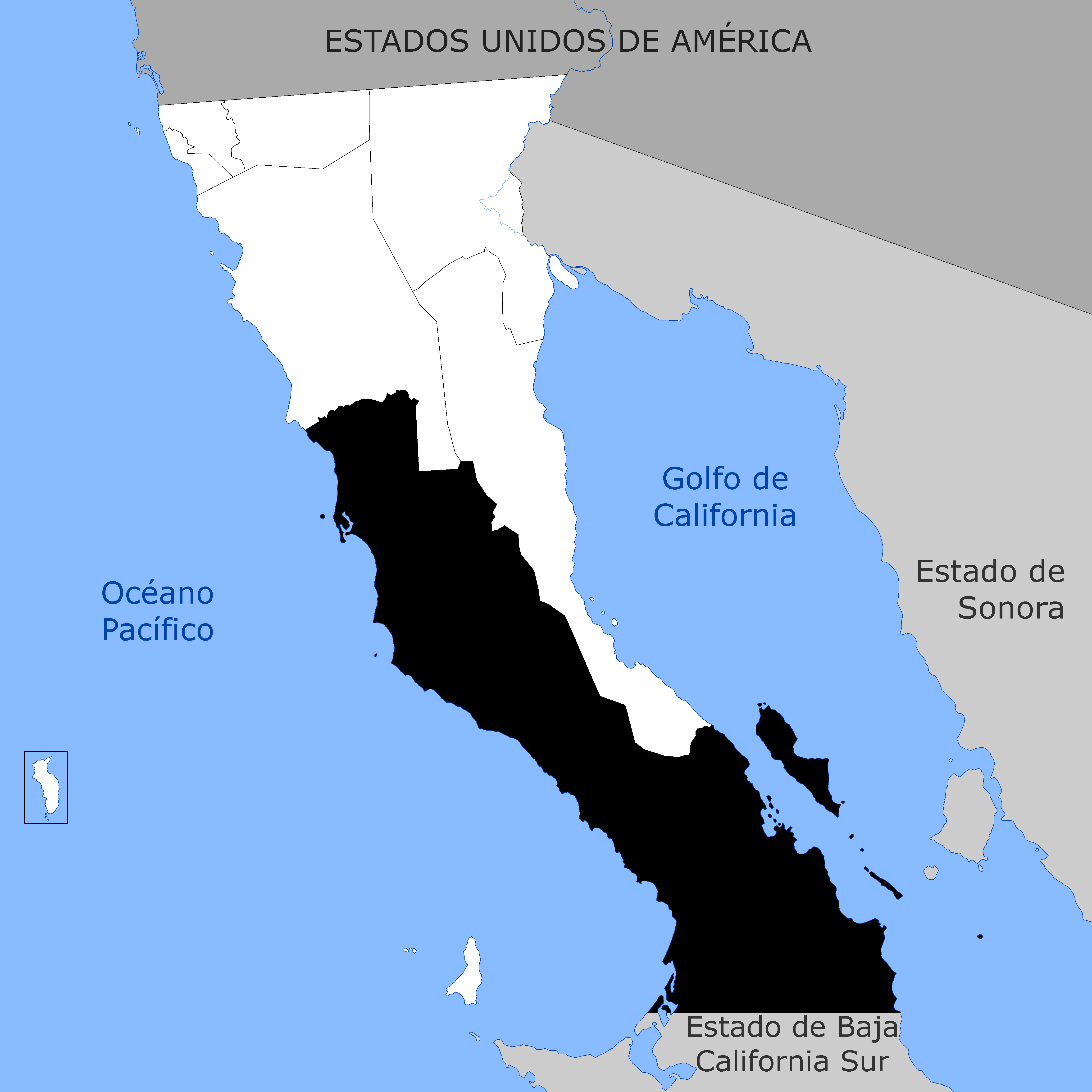 Demarcación del sexto municipio de Baja California